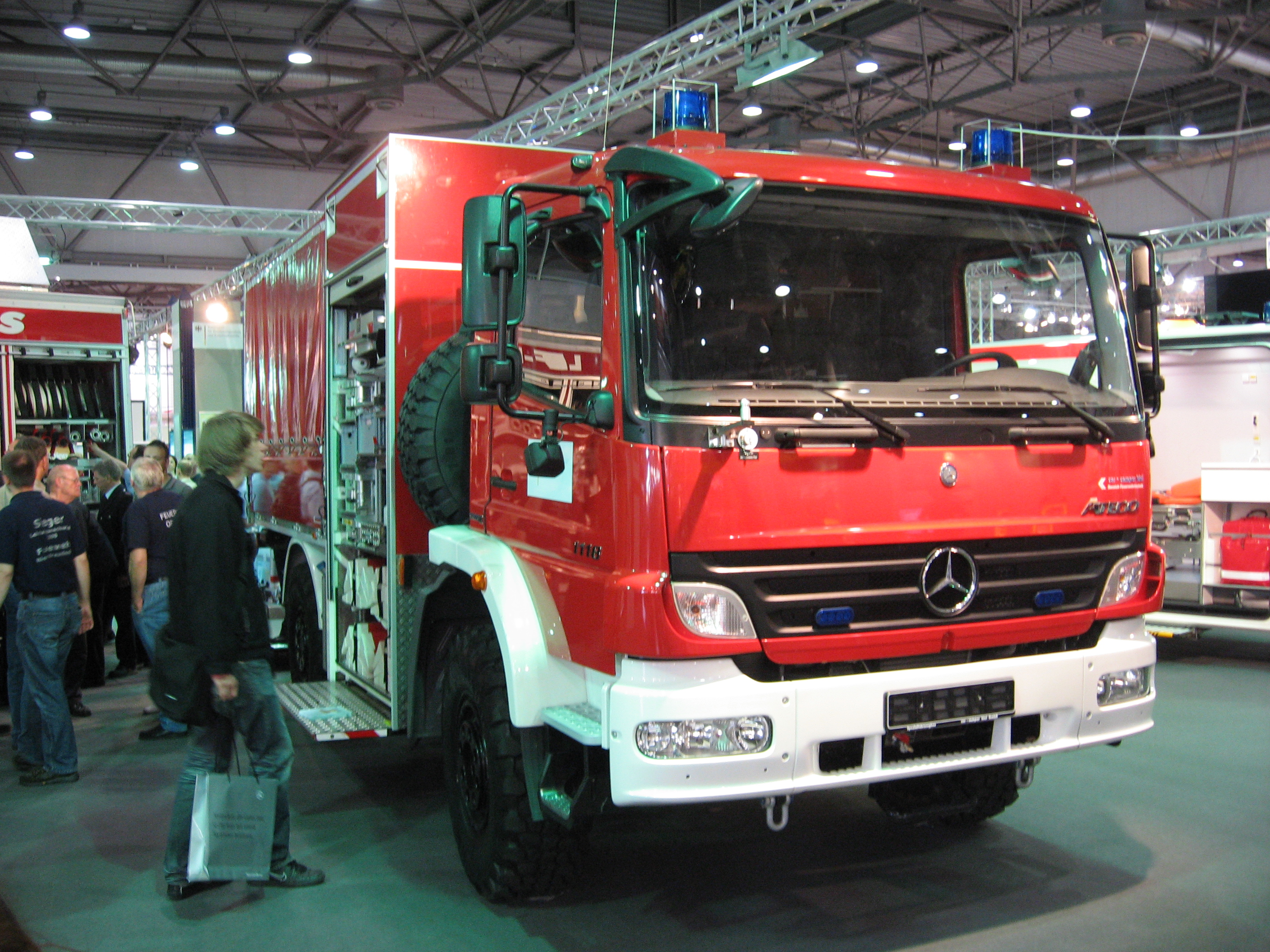 Prototyp des Schlauchwagens für den Katastrophenschutz (Interschutz 2010)